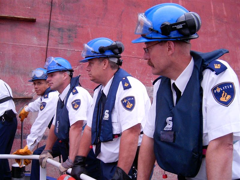 Medewerkers Grensbewaking ZHP